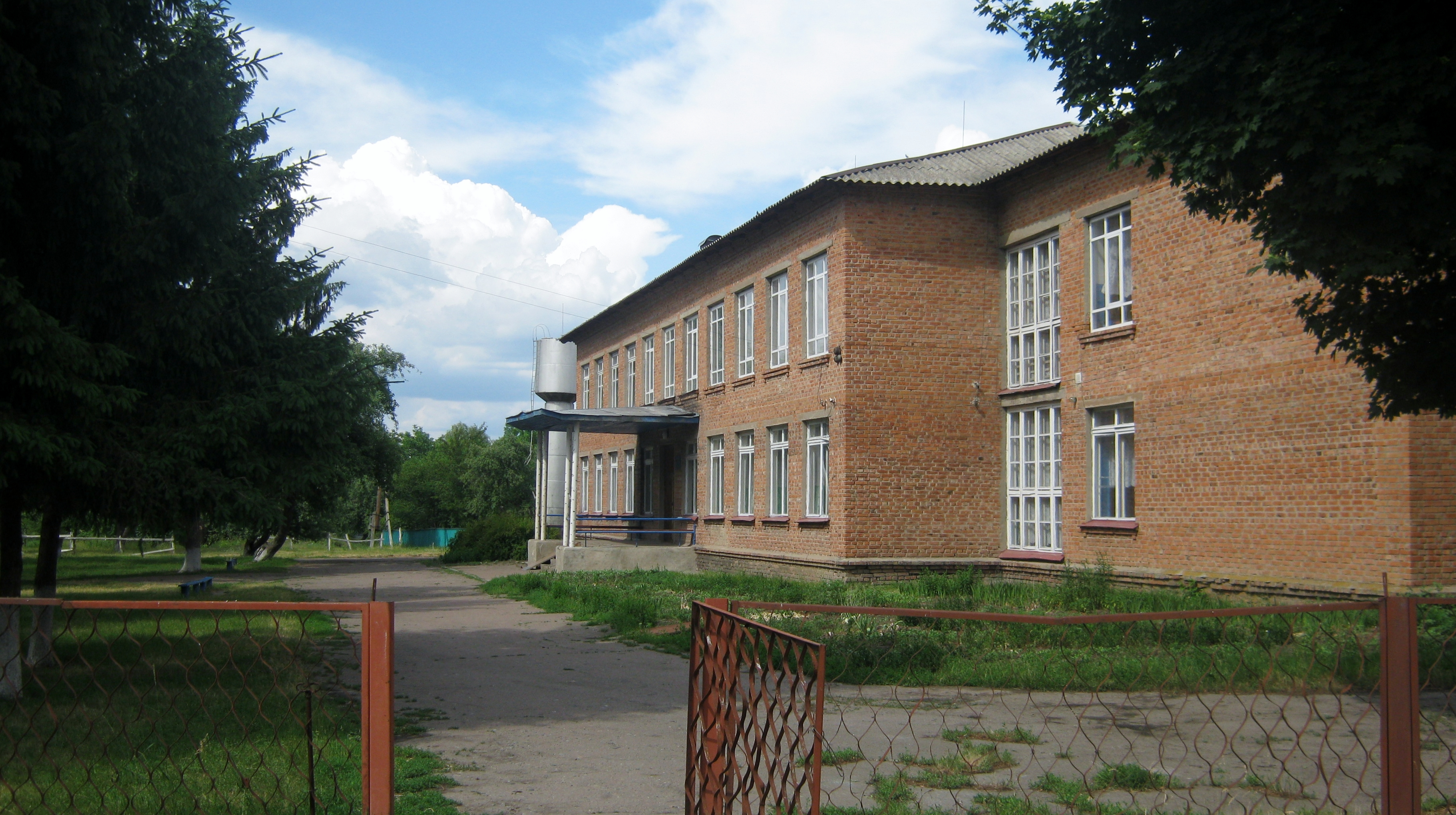 Приміщення школи у селі Великій Павлівці, Полтавська область